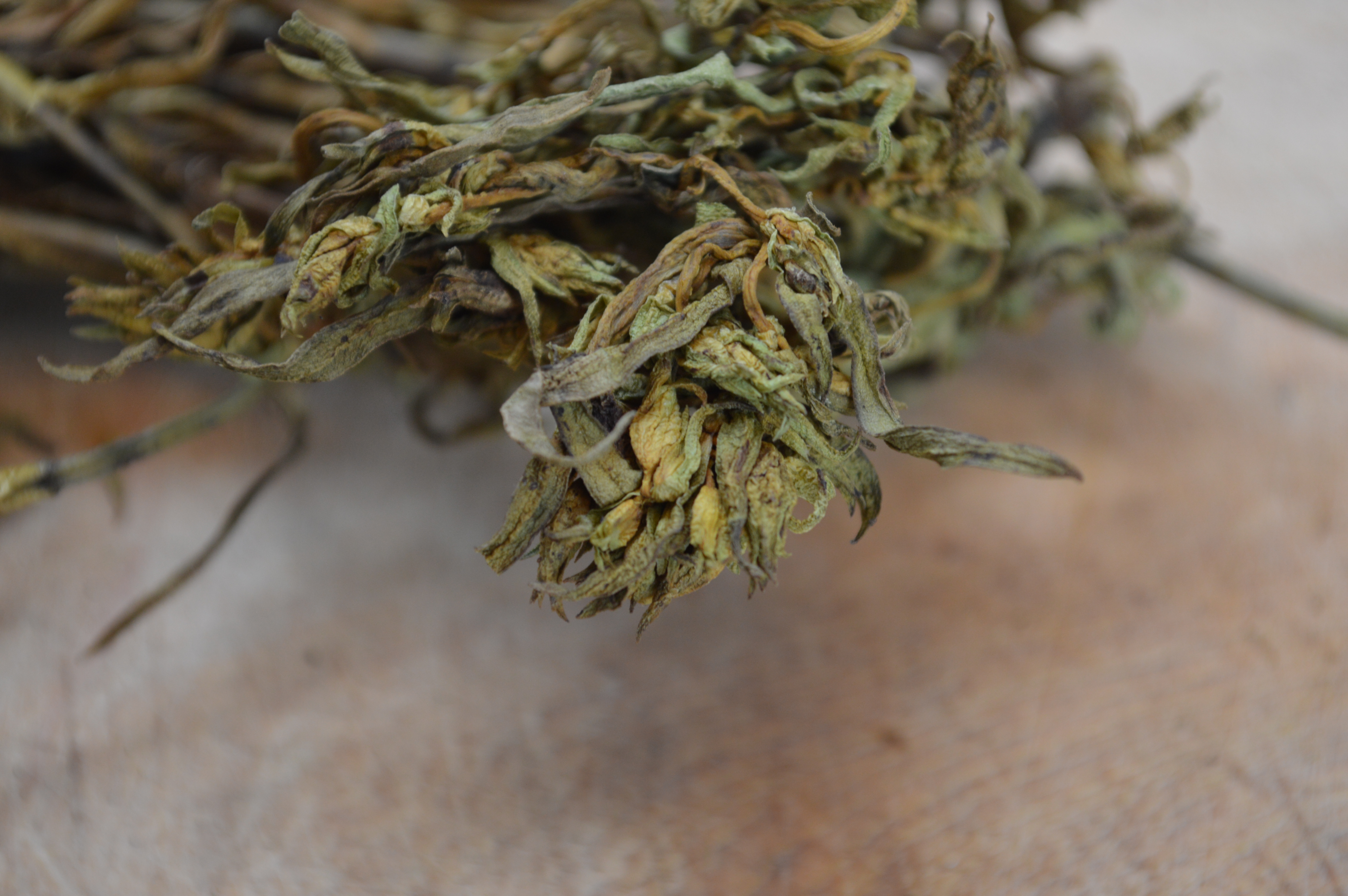 Hercampuri (Gentianella alborosea), planta seca, en Huaraz. Foto tomada en noviembre de 2019.